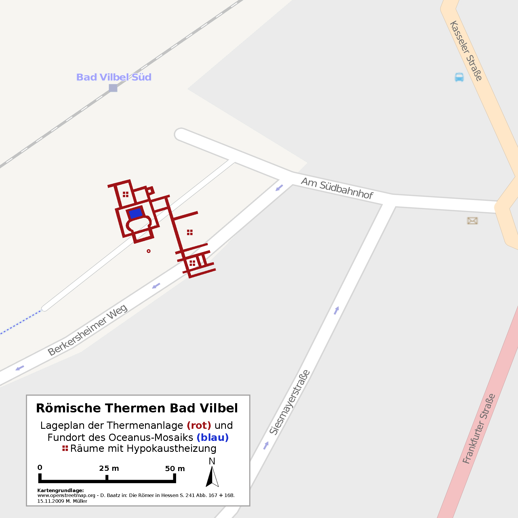 Lageplan der Römischen Thermen Bad Vilbel, Wetteraukreis, Hessen.